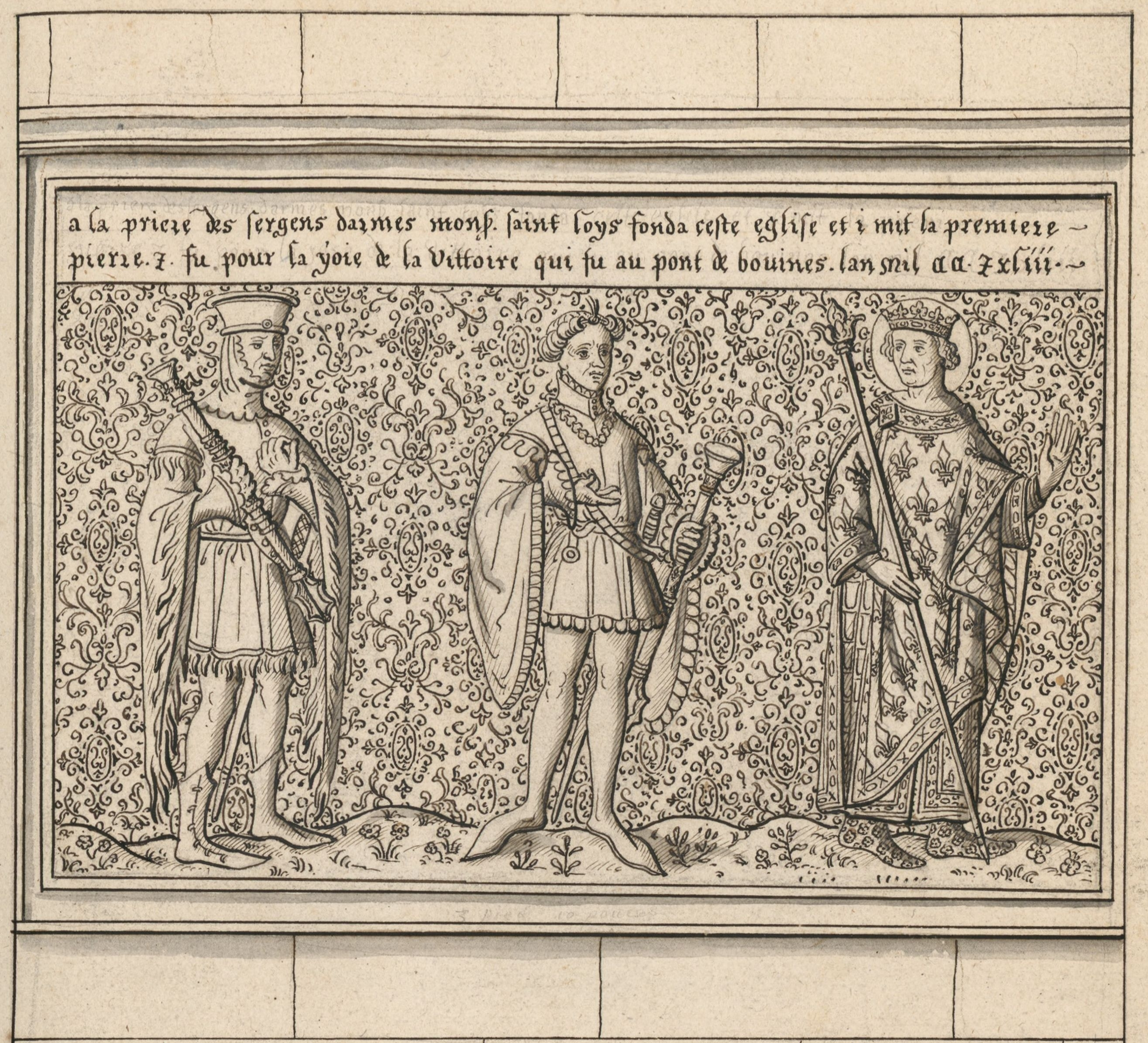 Pierre murale du XIVe siècle, autrefois à l'église Sainte-Catherine du Val des Écoliers de Paris, sur laquelle sont représentés le roi Louis IX et des sergents d'armes du temps de Charles V.